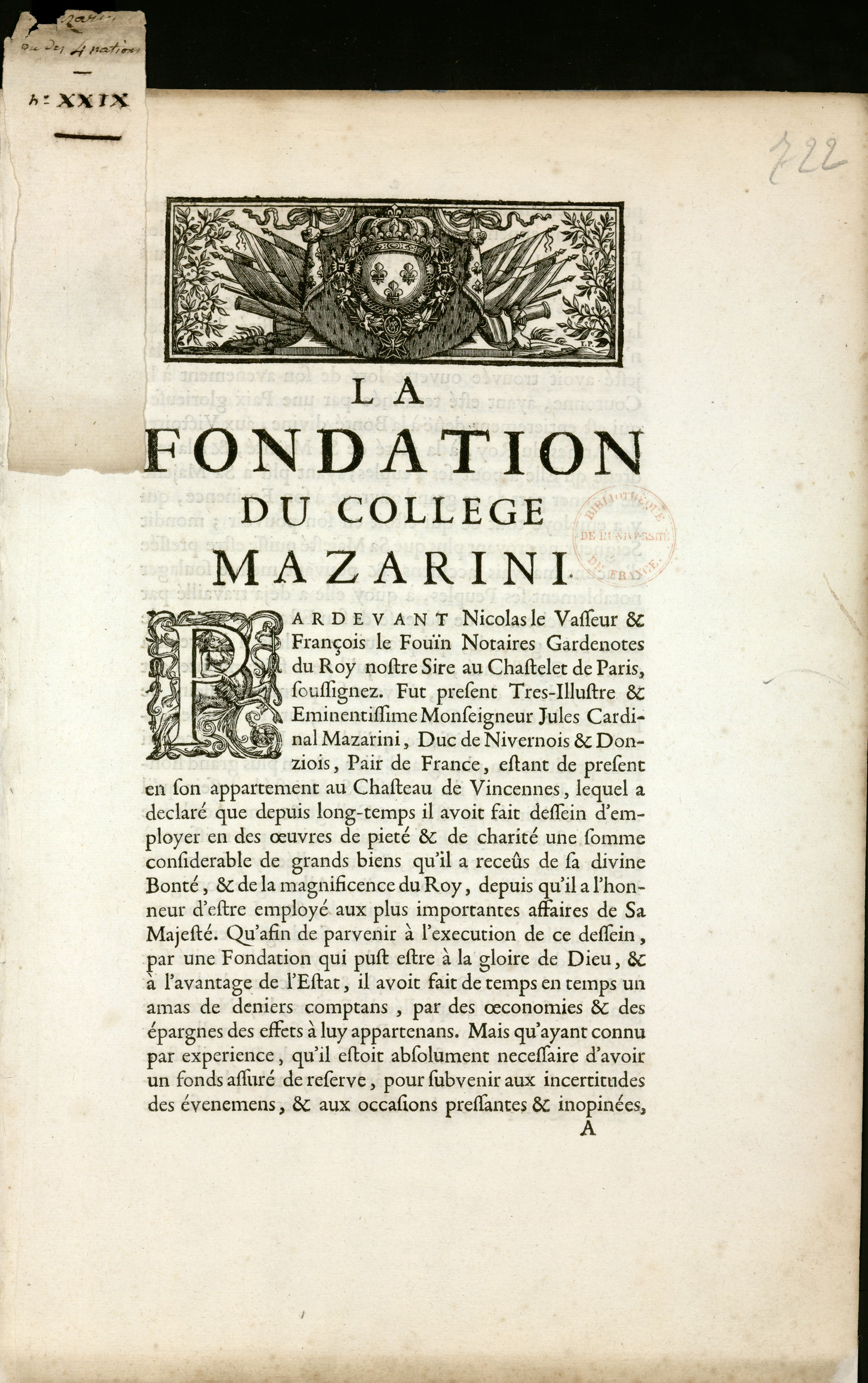 Monographie imprimée, dans un registre de 738 feuillets consacré aux fondations et statuts des collèges.